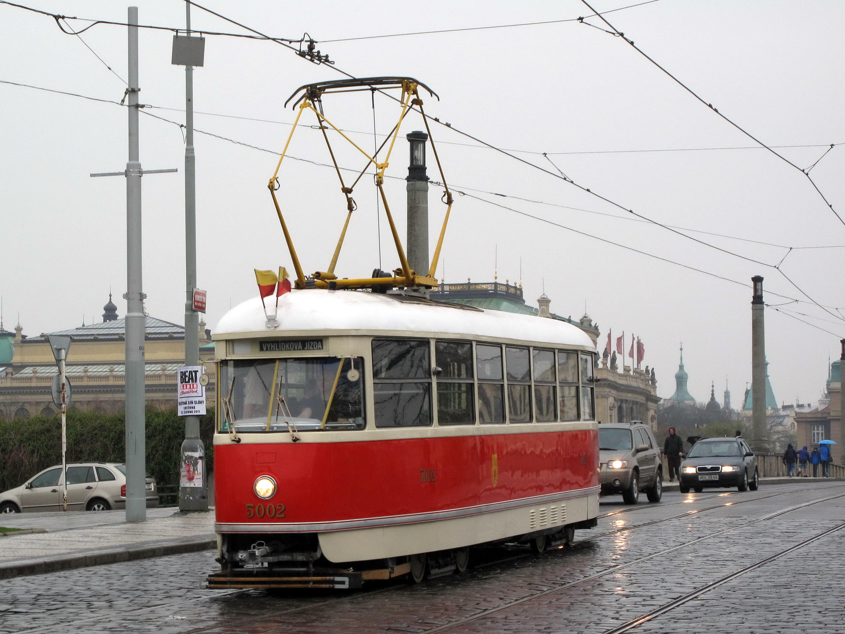 Tatra T1 v Praze